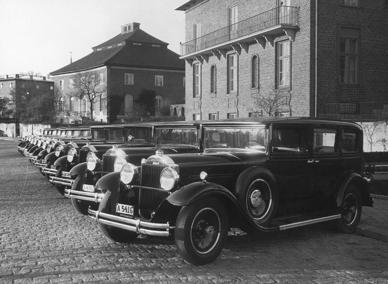 Bilar från Freys Hyrverk parkerade i Diplomatstaden. Bilar av det amerikanska märket Packard. Den Bünsowska villan är mellersta byggnden